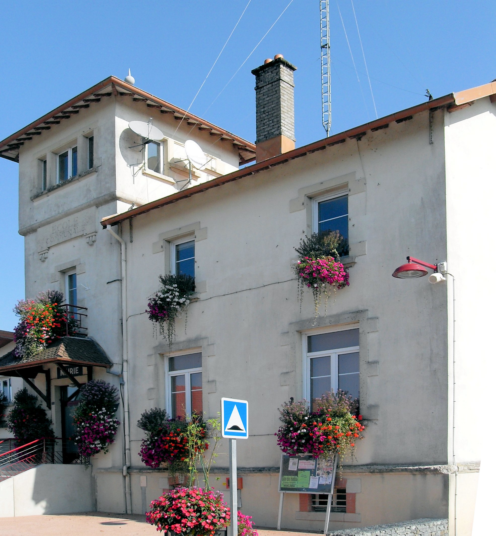 La mairie d'Andelnans